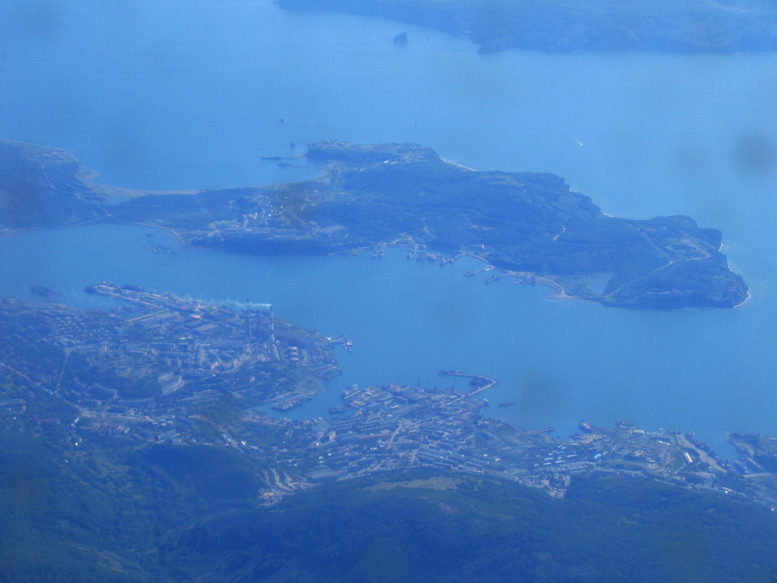 Вид на полуостров Завойко с борта самолёта